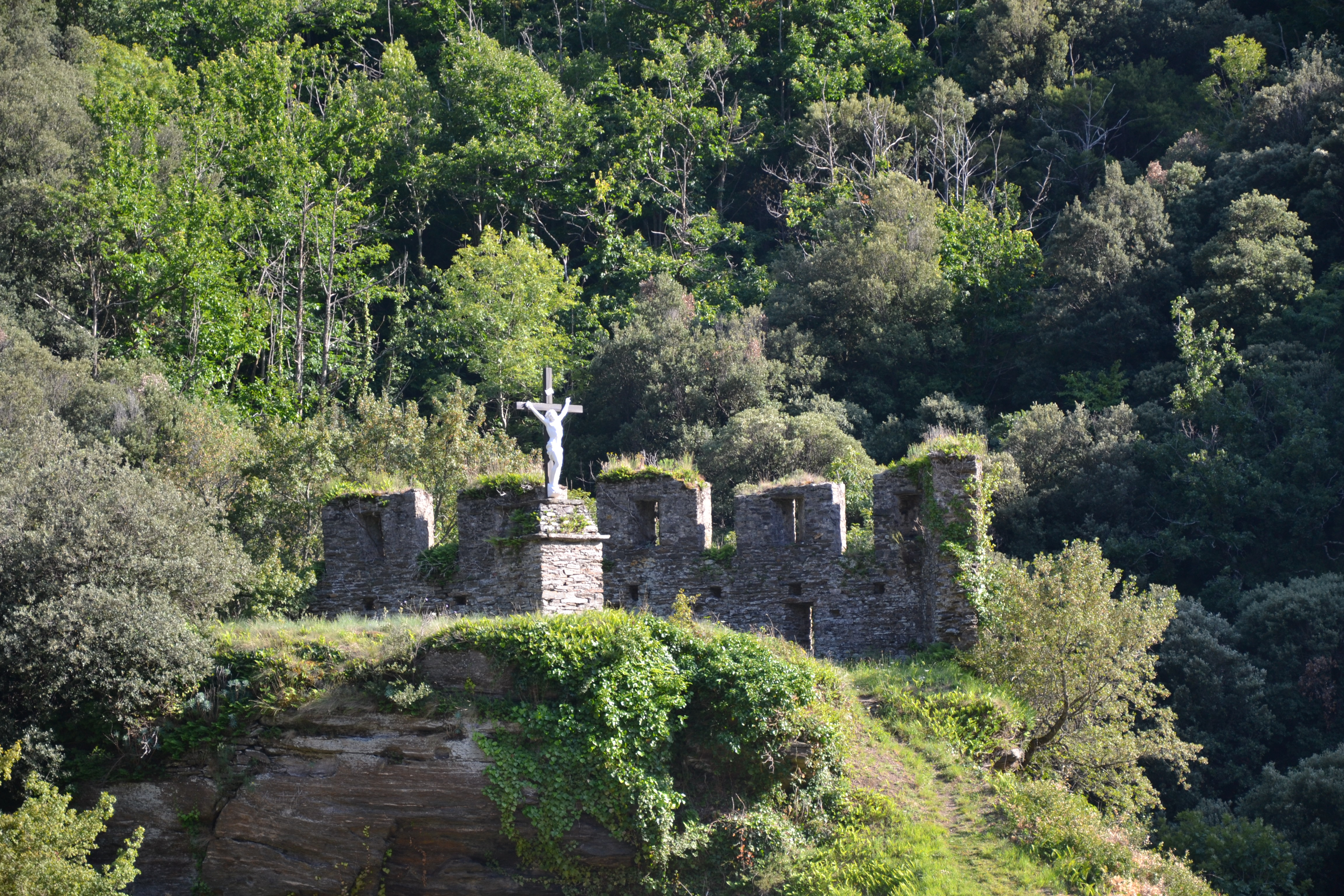 Remparts du château